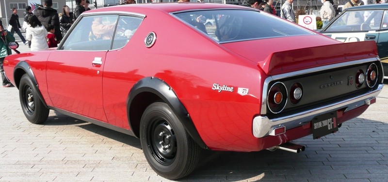 Nissan Skyline GT-R.